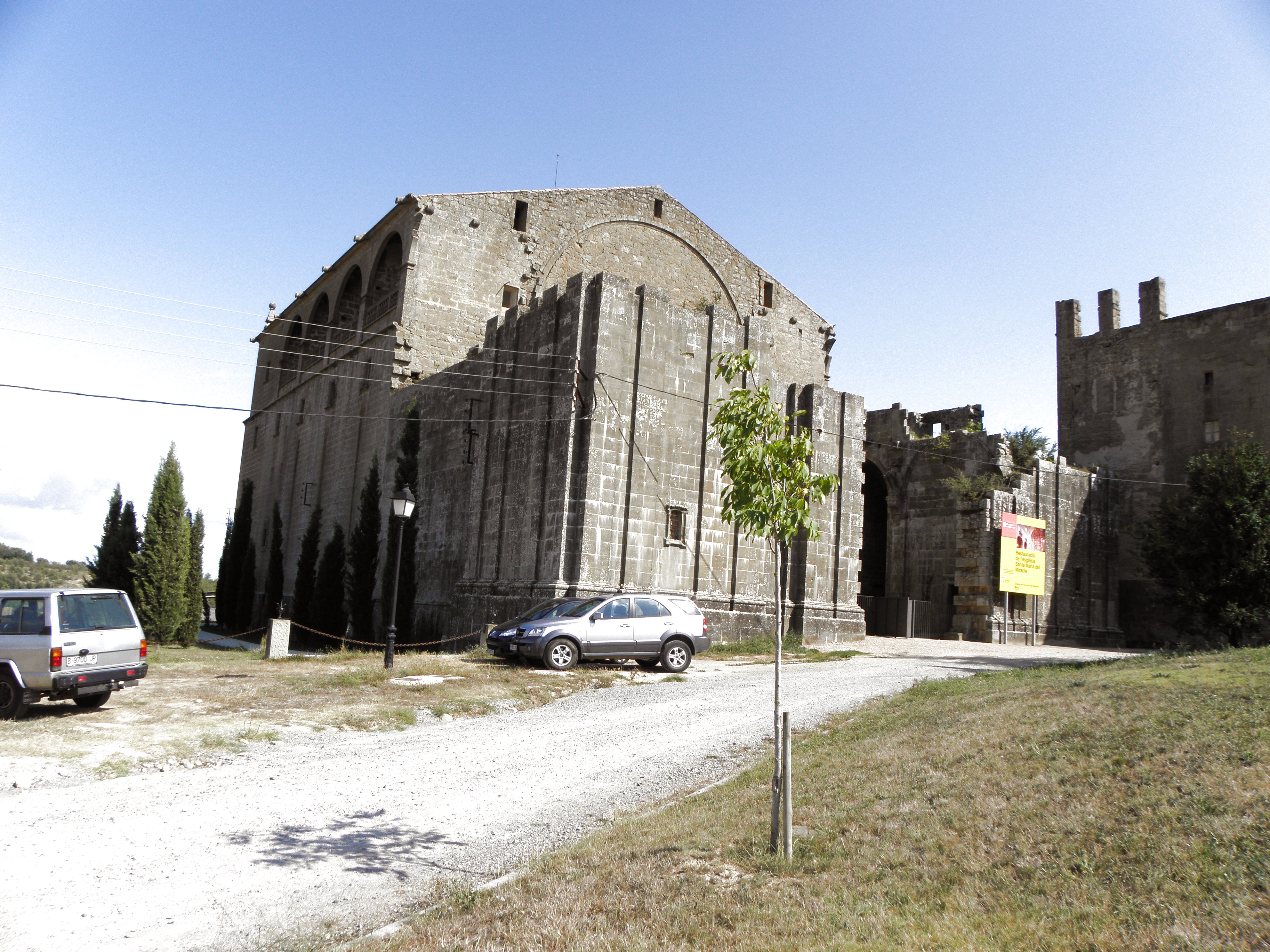 La part inacabada de l'església del Santuari del Miracle (Riner, Solsonès)